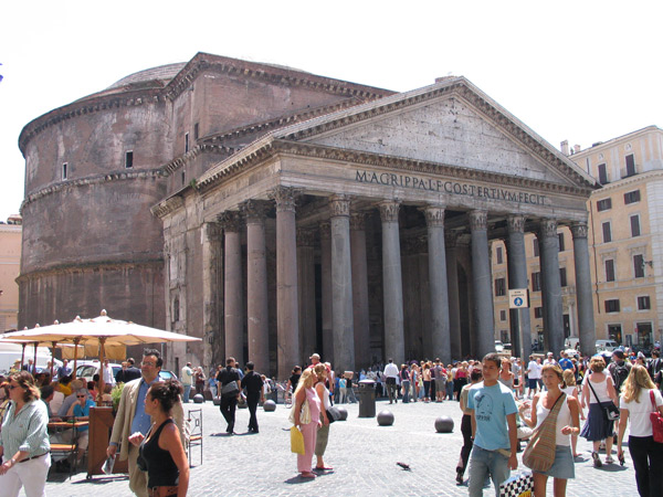 Het Pantheon in Rome, een van de top-tien bezienswaardigheden van de stad, gefotografeerd in de mei 2006